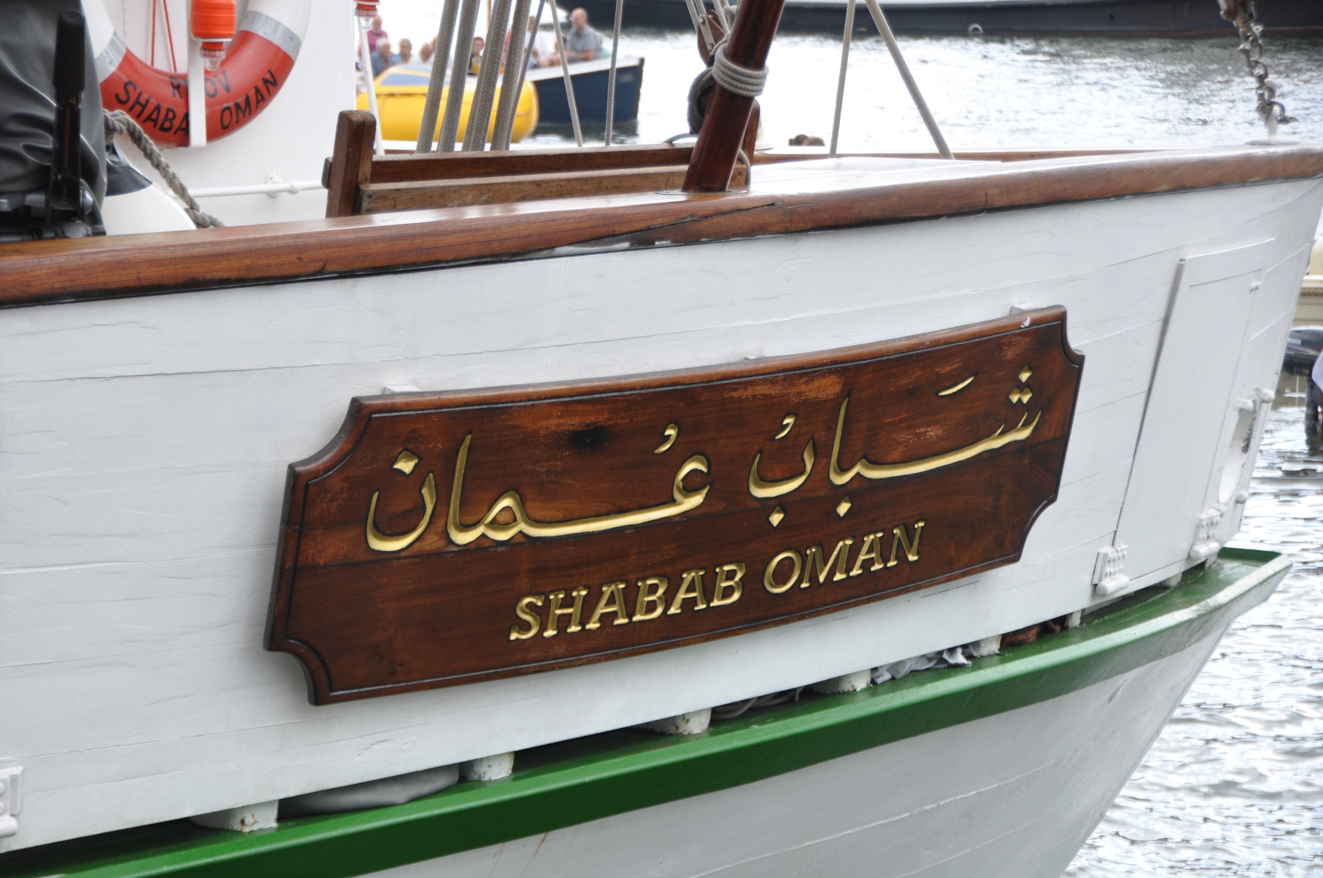 De SHABAB OMAN voor de wal bij Sail Amsterdam 2010.